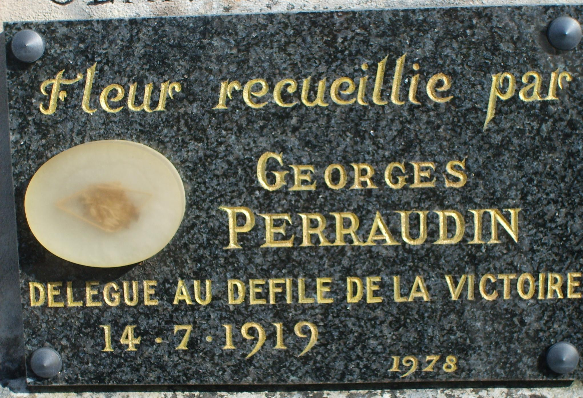 fleurs Georges Perraudin